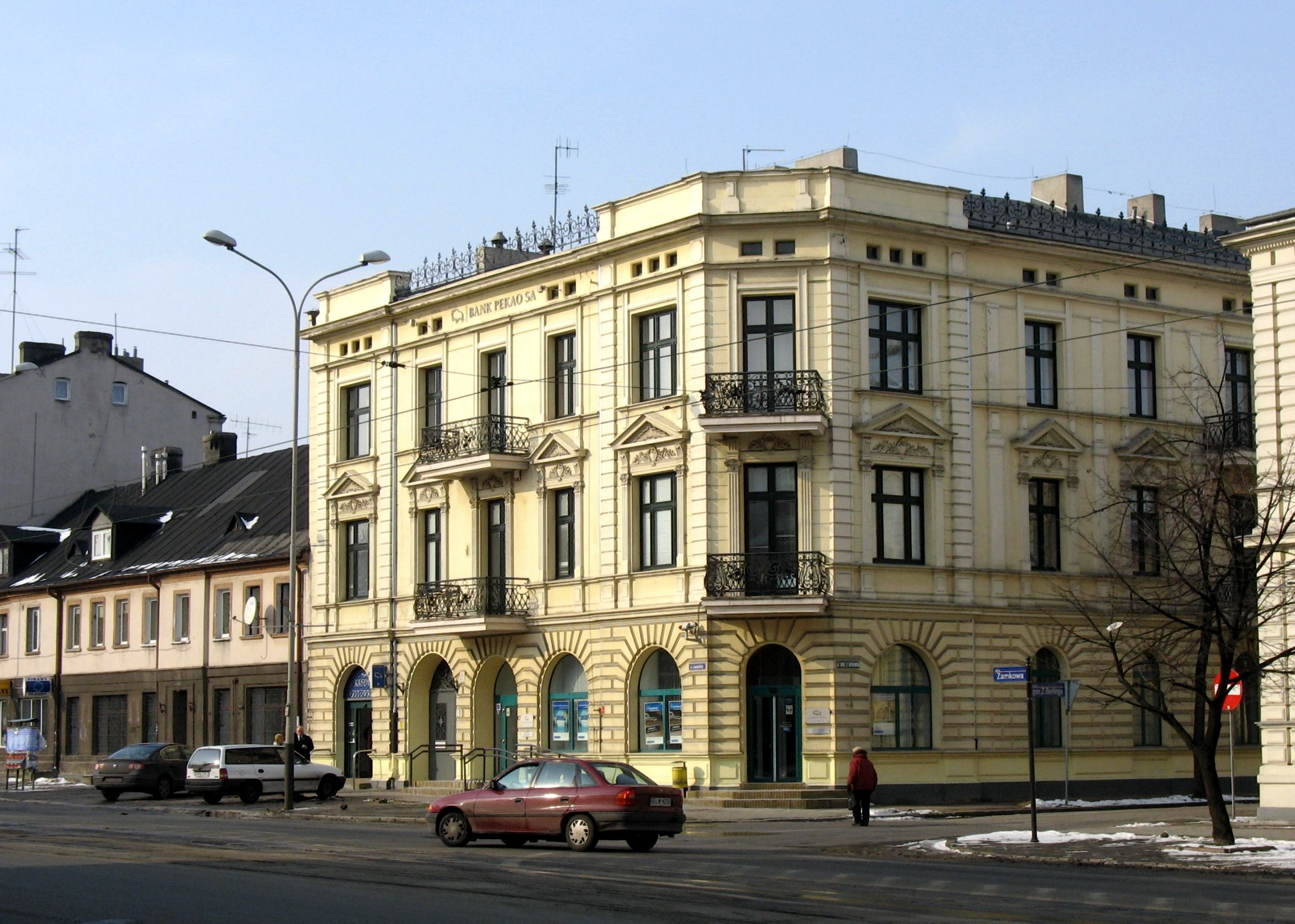 Pabianice - Kamiennice w centrum miasta.